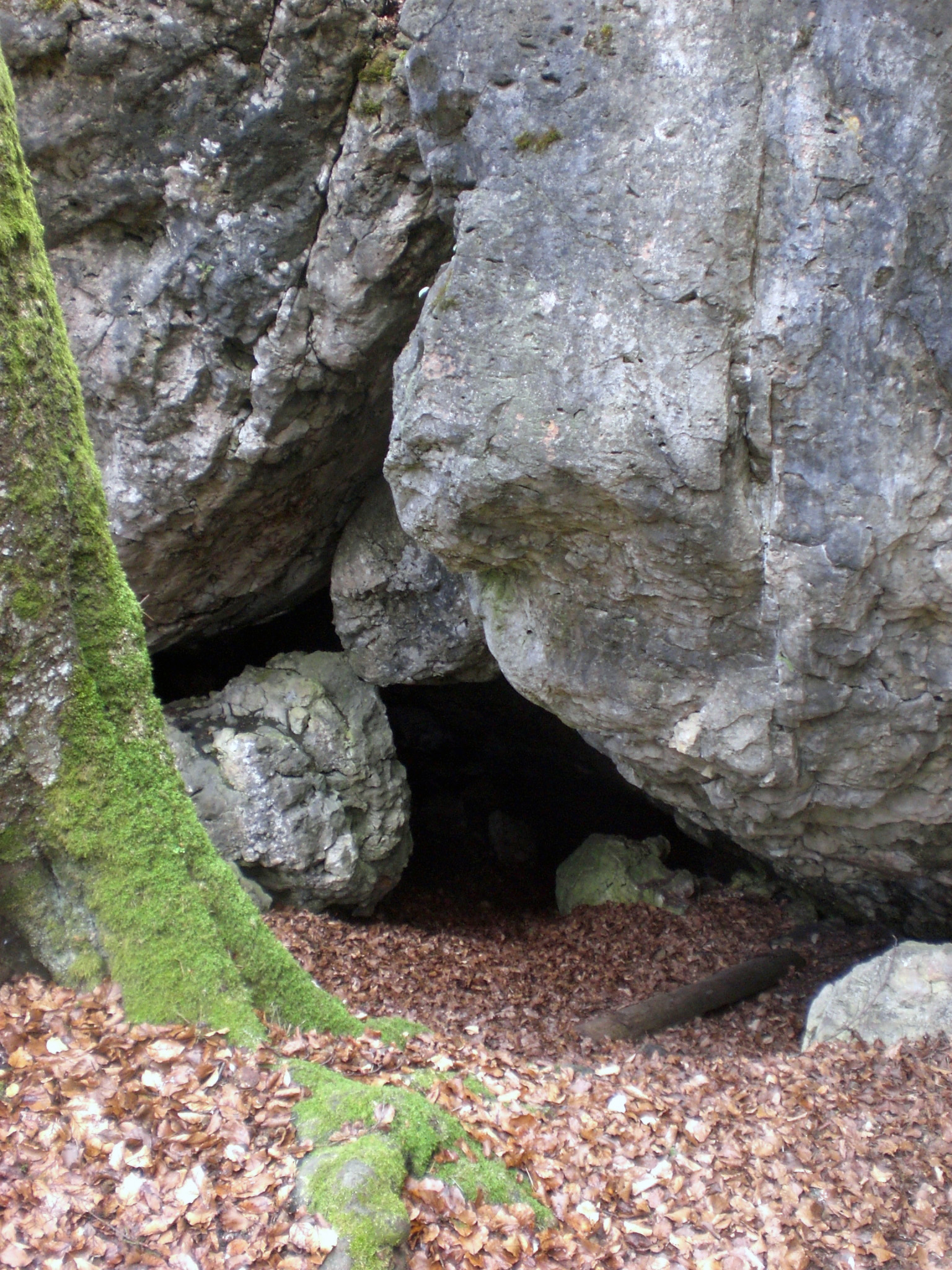 Bodendenkmal D-3-6536-0040: Höhle "Osterloch" (E 8) mit Funden der Bronzezeit, der Urnenfelderzeit, der Hallstattzeit und der Latènezeit.